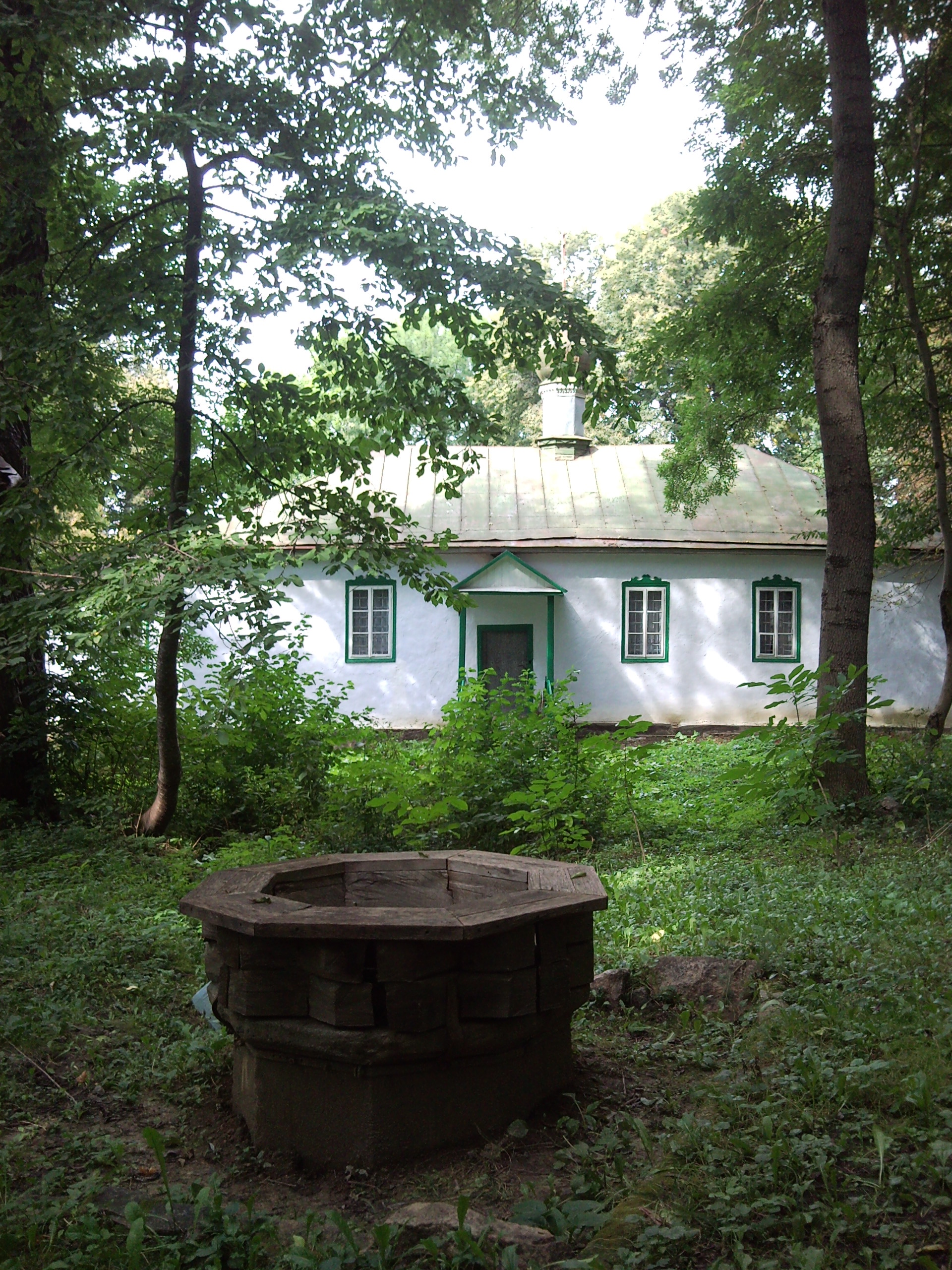 Борсків. Криниця біля церкви